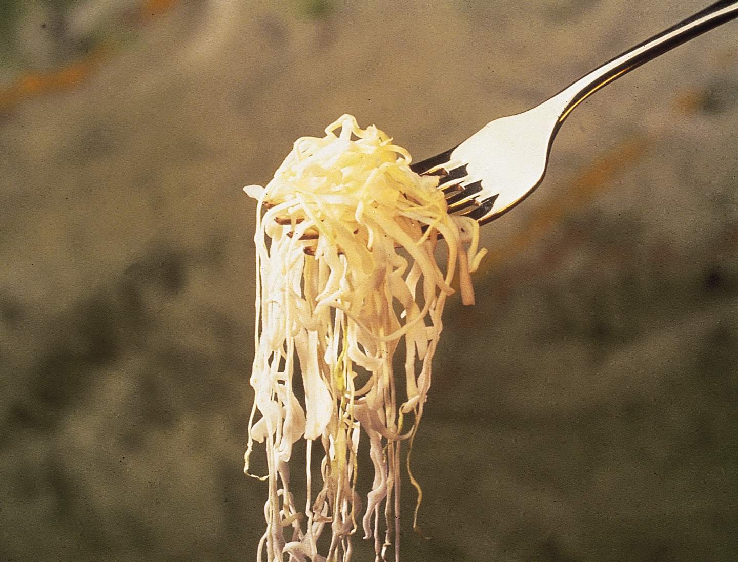 choucroute